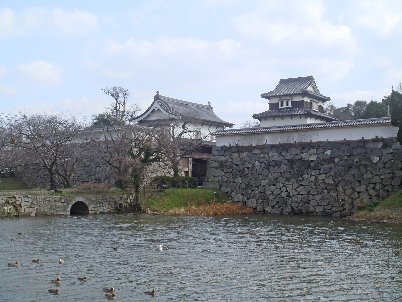 日本の福岡県福岡市の舞鶴公園に所在する、福岡城 下の橋大手門の跡を明治通り大手門交差点付近より撮影。中央の左が大手虎口の櫓門（上部建築の櫓（切妻造）は焼失後の追加復元。下部建築は焼失により破損後修復され一部現存）、右の建築は黒田邸より移築復元された伝潮見櫓（実際は別の櫓であることが分かっている）。塀は模擬建築である。